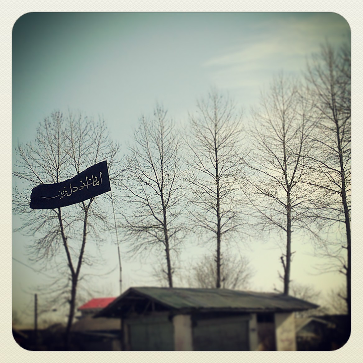 لشت نشا